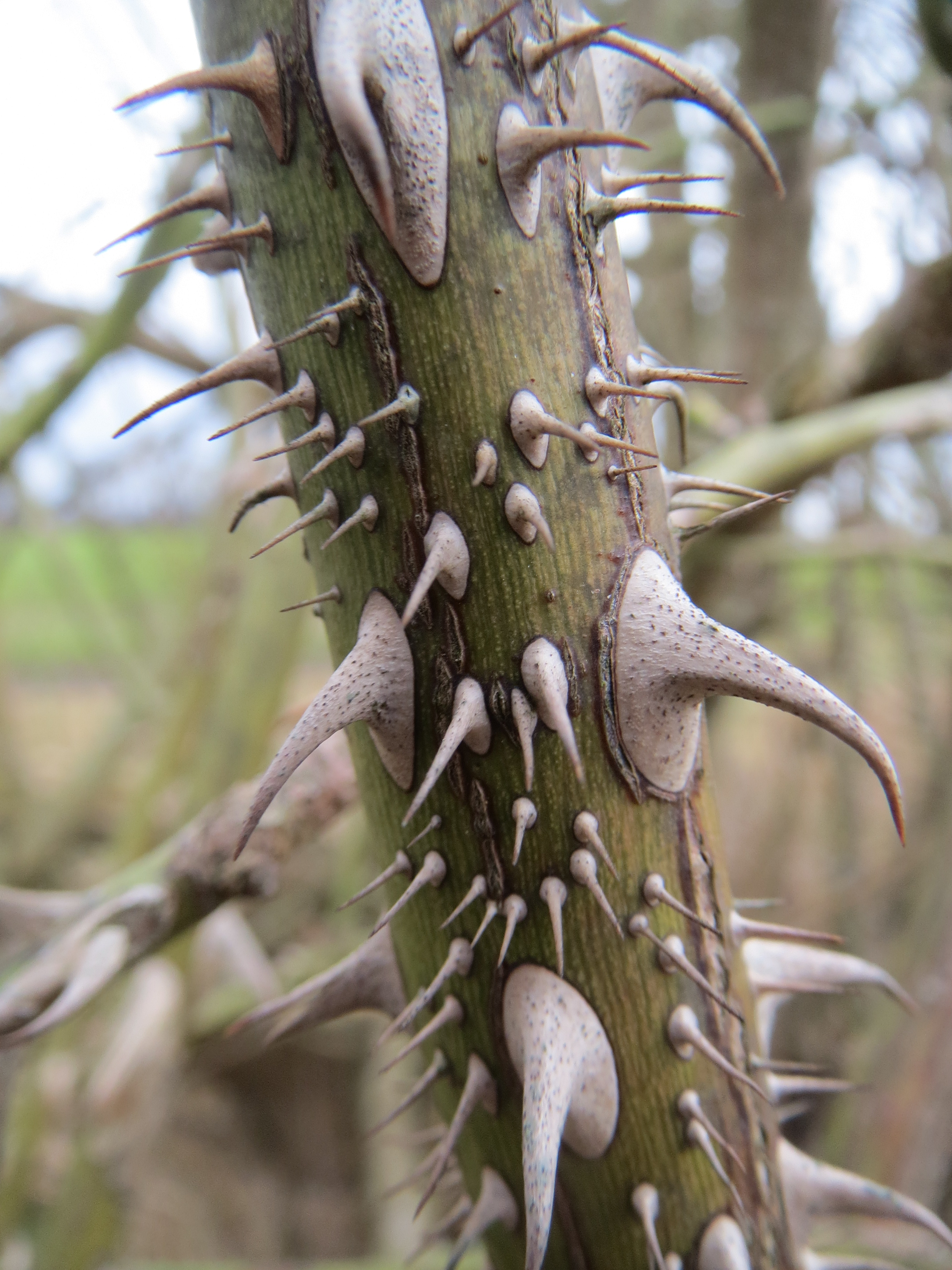 Wein-Rose (Rosa rubiginosa) im Hockenheimer Rheinbogen